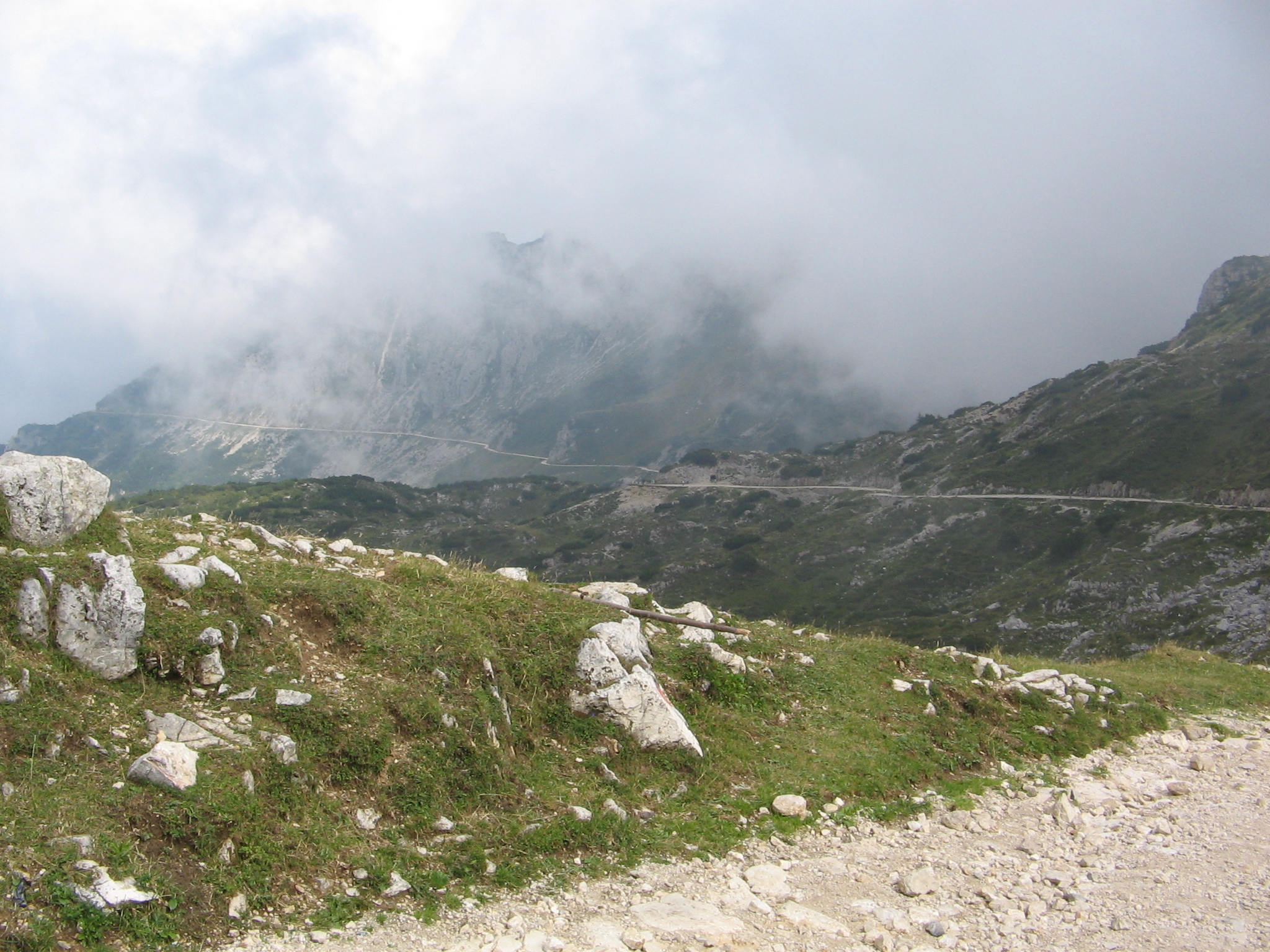 Strada dei Scarubi, Val Sorapache, Pasubio